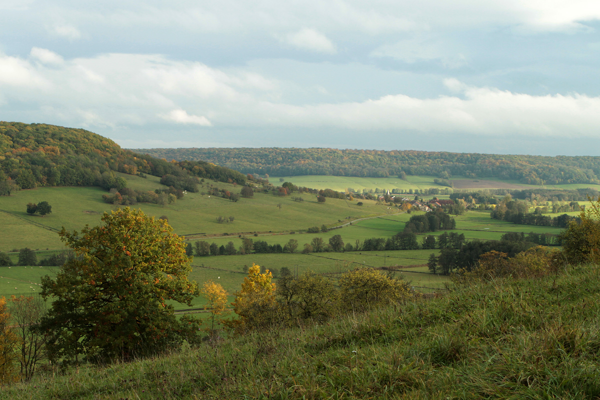 Vue sur la vallée de la Petite Amance depuis Varennes